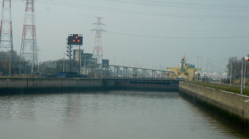 The kallolock in Antwerp / Kallosluis in Antwerpen